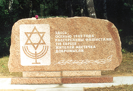 Памятник евреям, убитым нацистами в деревне Добромысли Лиозненского района во время Холокоста. Находится недалеко за деревней в нескольких метрах слева от обочины дороги Р109 (в направлении из Добромыслей на Лиозно).